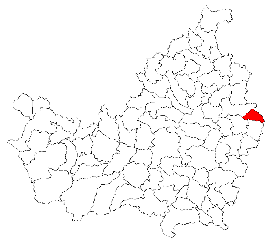 Categorie:Hărţi ale judeţului Cluj